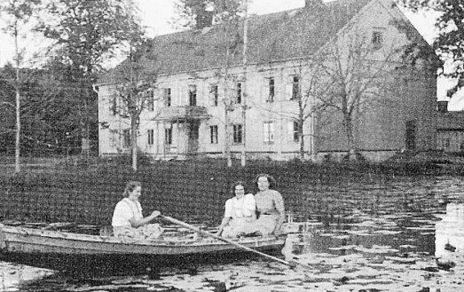 På dammen bakom Taxinges huvudbyggnad i slutet av 1930-talet.